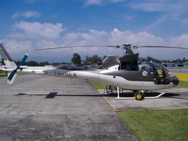 Ecureuil AS350B3 (TG--GEA)